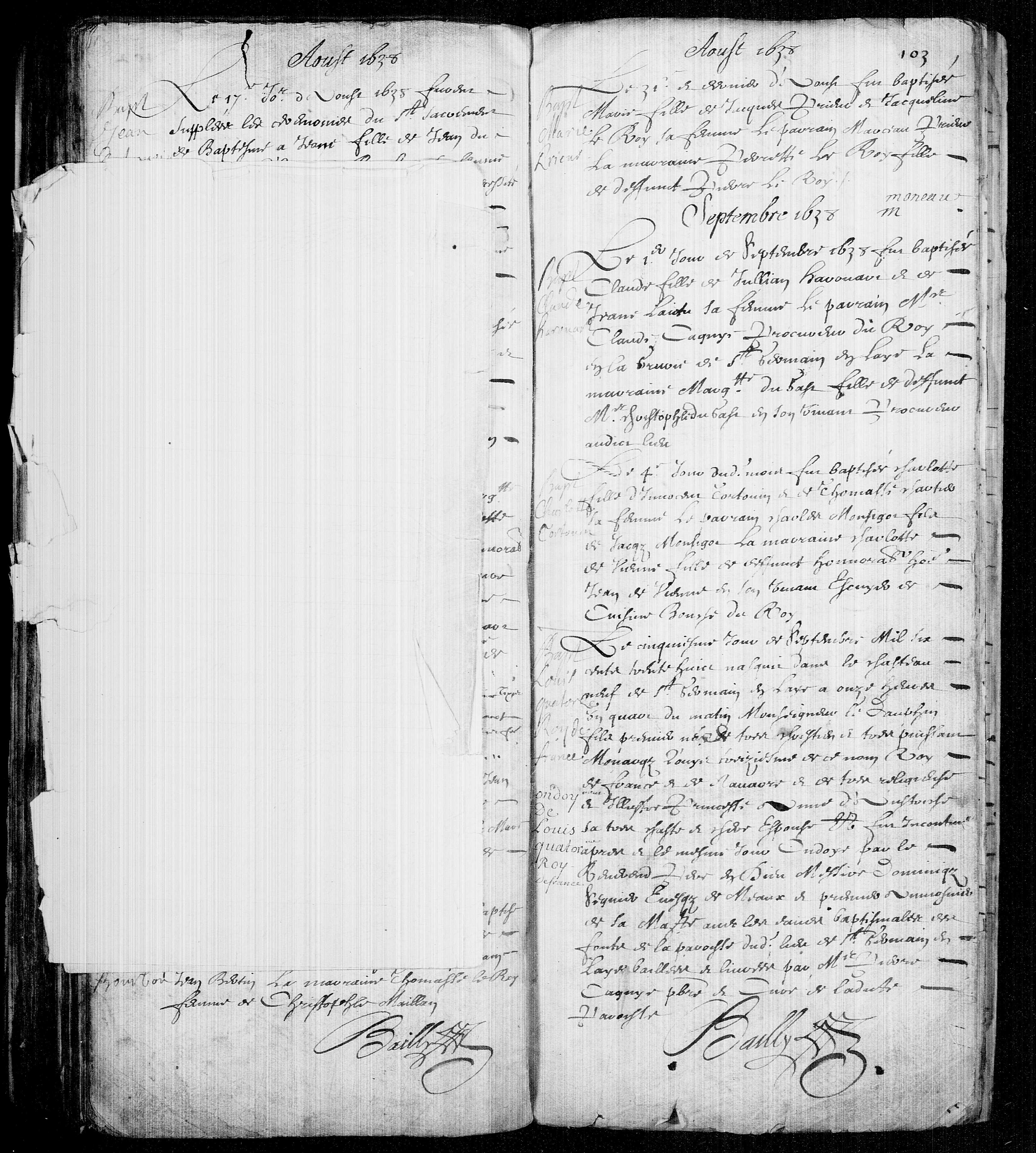 Archives Yvelines